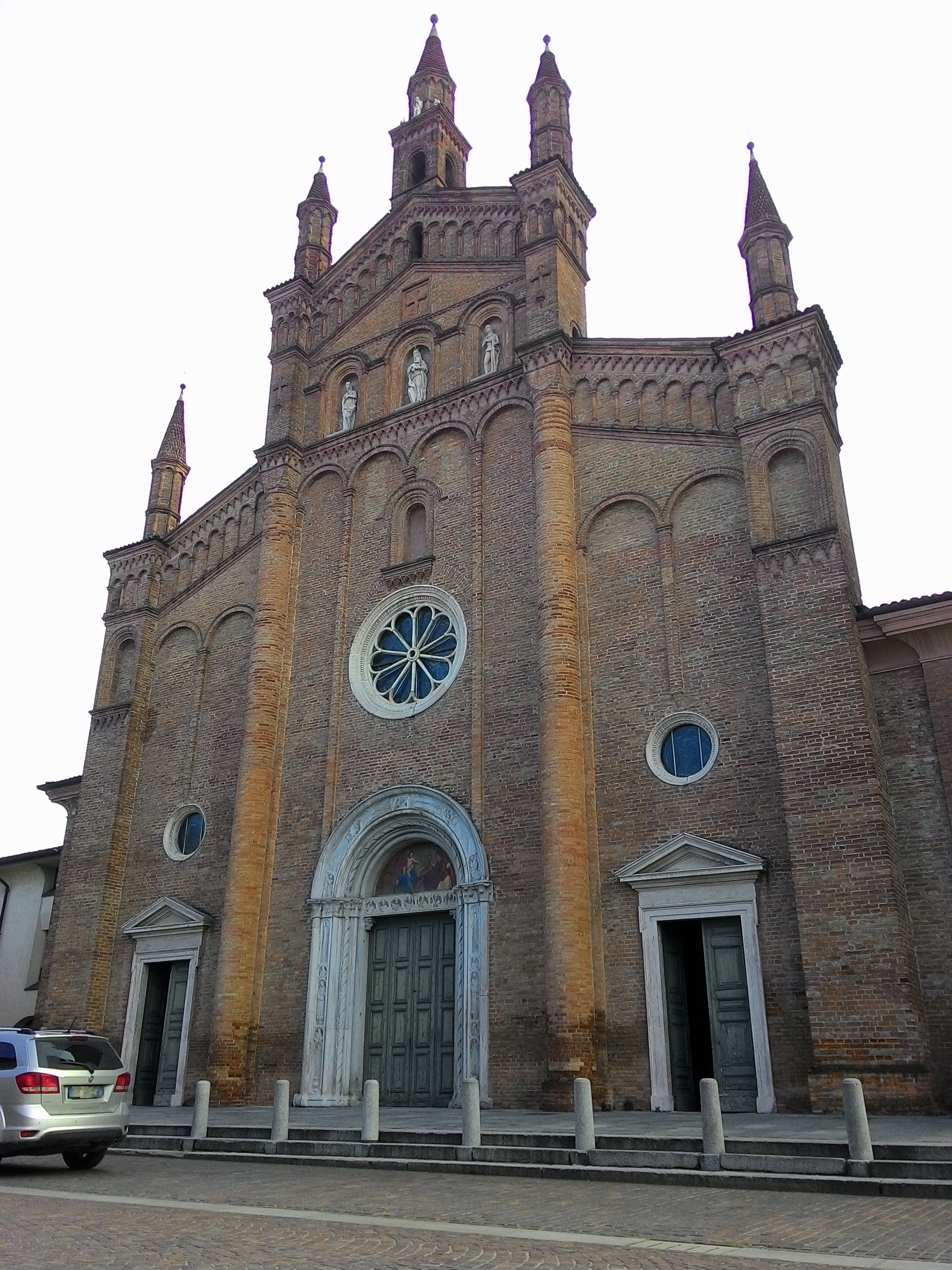 Chiesa parrocchiale di Caravaggio (BG)